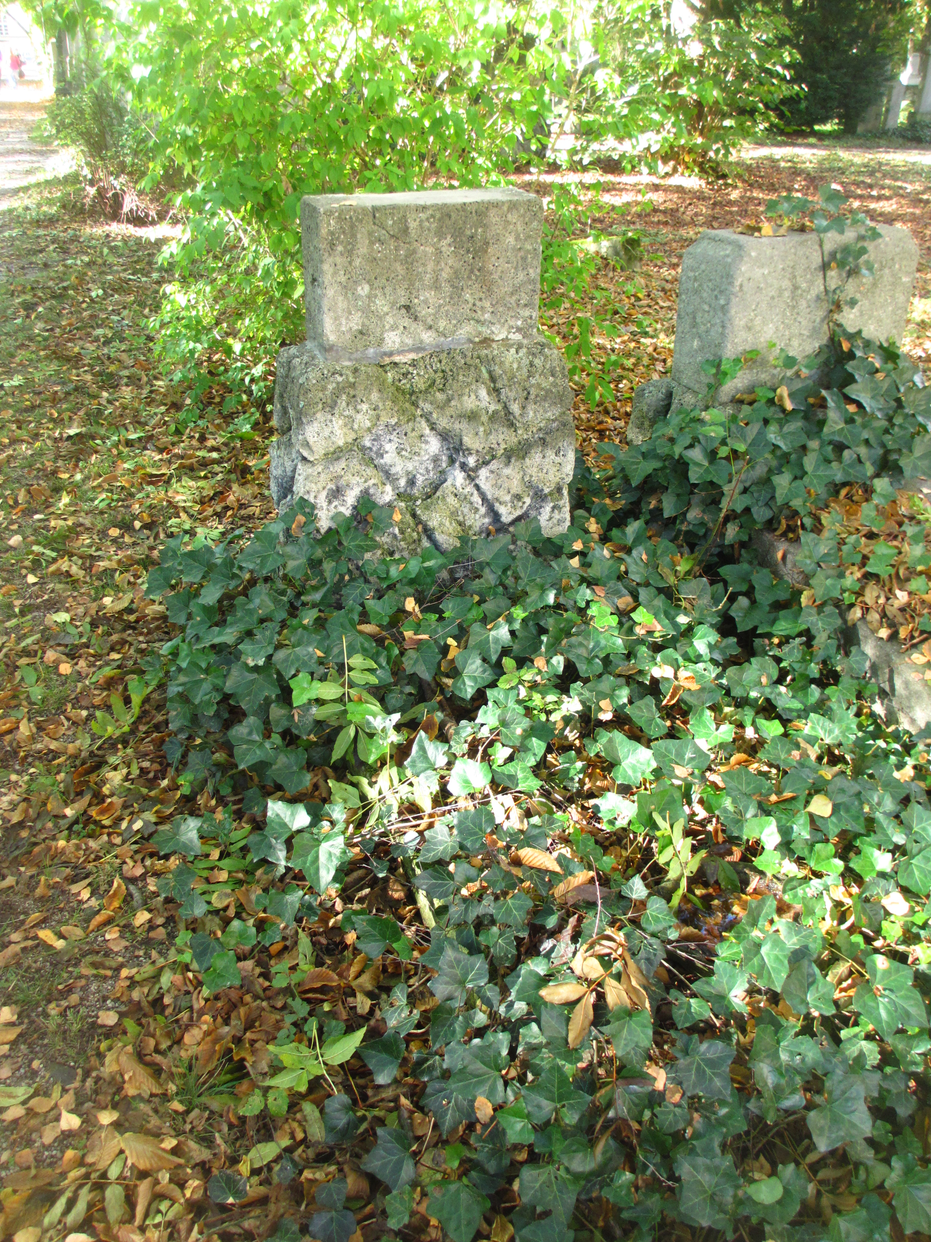 Grab von Otto Seitz auf dem Alten Suedlichen Friedhof in Muenchen-Graeberfeld GF-7-5-56